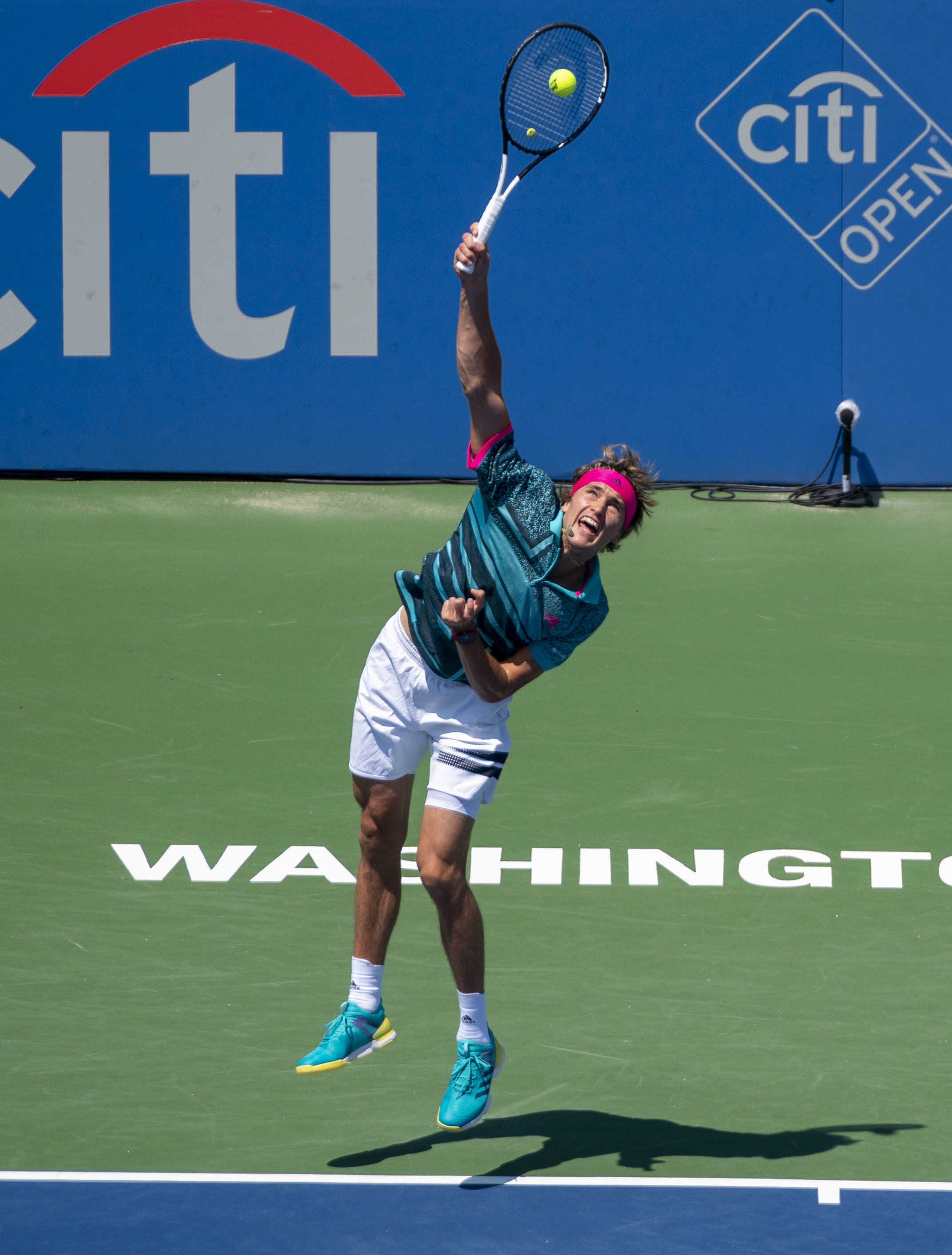 2018 Citi Open Tennis